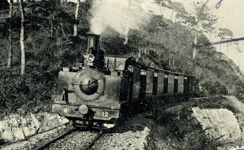 Locomotive n°12 des Chemins de Fer Départementaux du Finistère (ligne Douarnenez - Audierne)